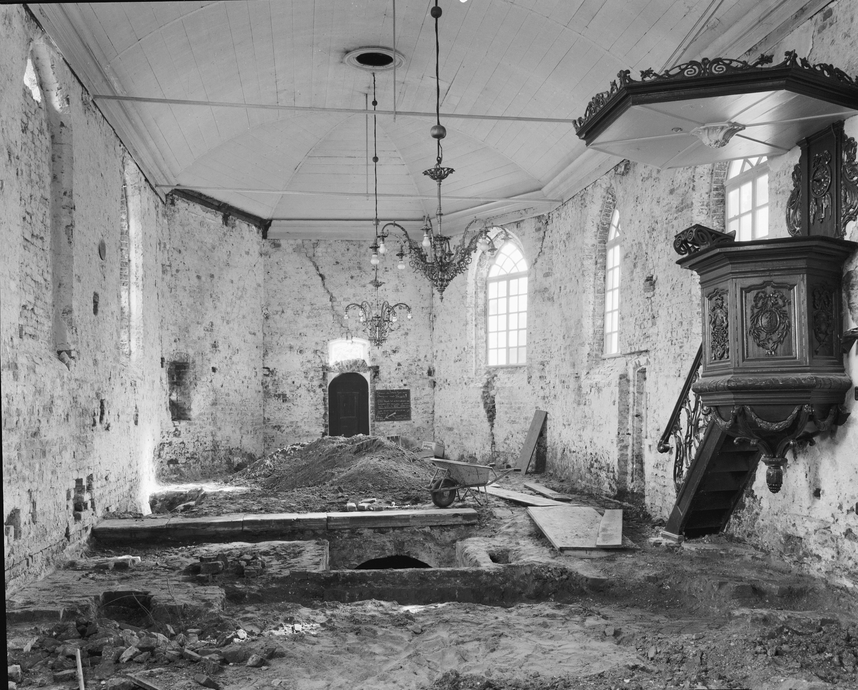 Nederlands Hervormde Kerk: interieur naar het oosten